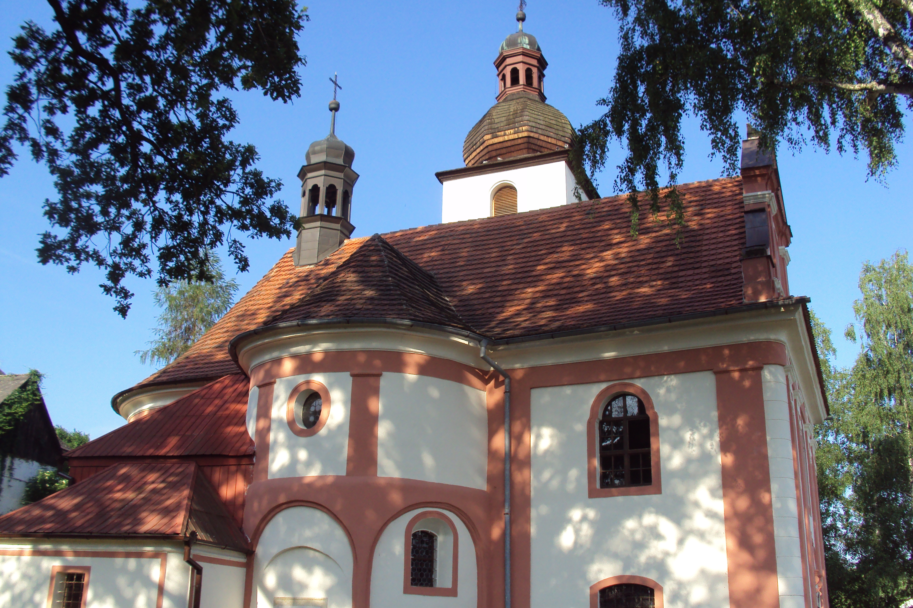 Kostel sv.Václava v Deštné